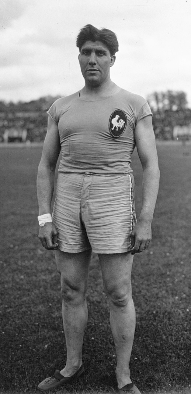 Stade Pershing, match athlétisme France-Angleterre : Paoli, portrait à 2 m 50 : [photographie de presse] / Agence Meurisse